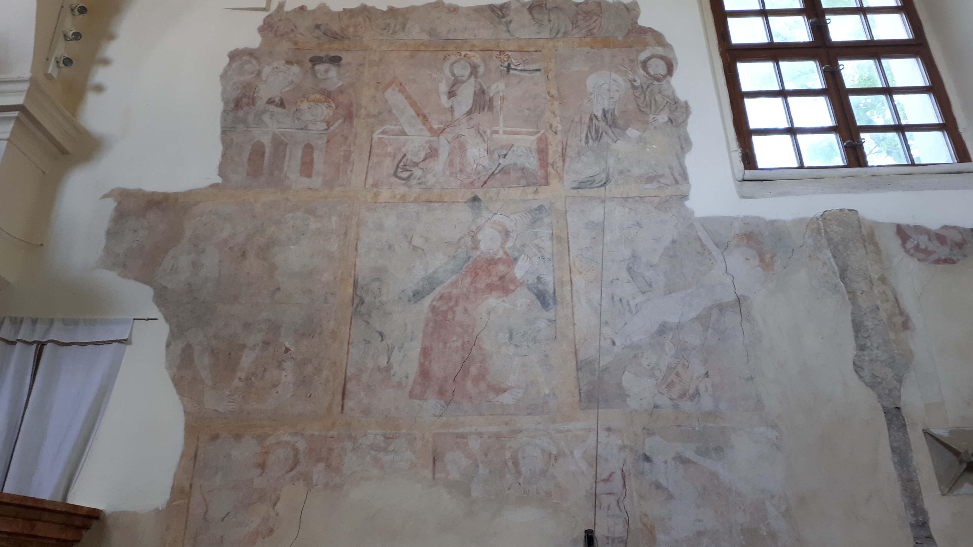 Drásov